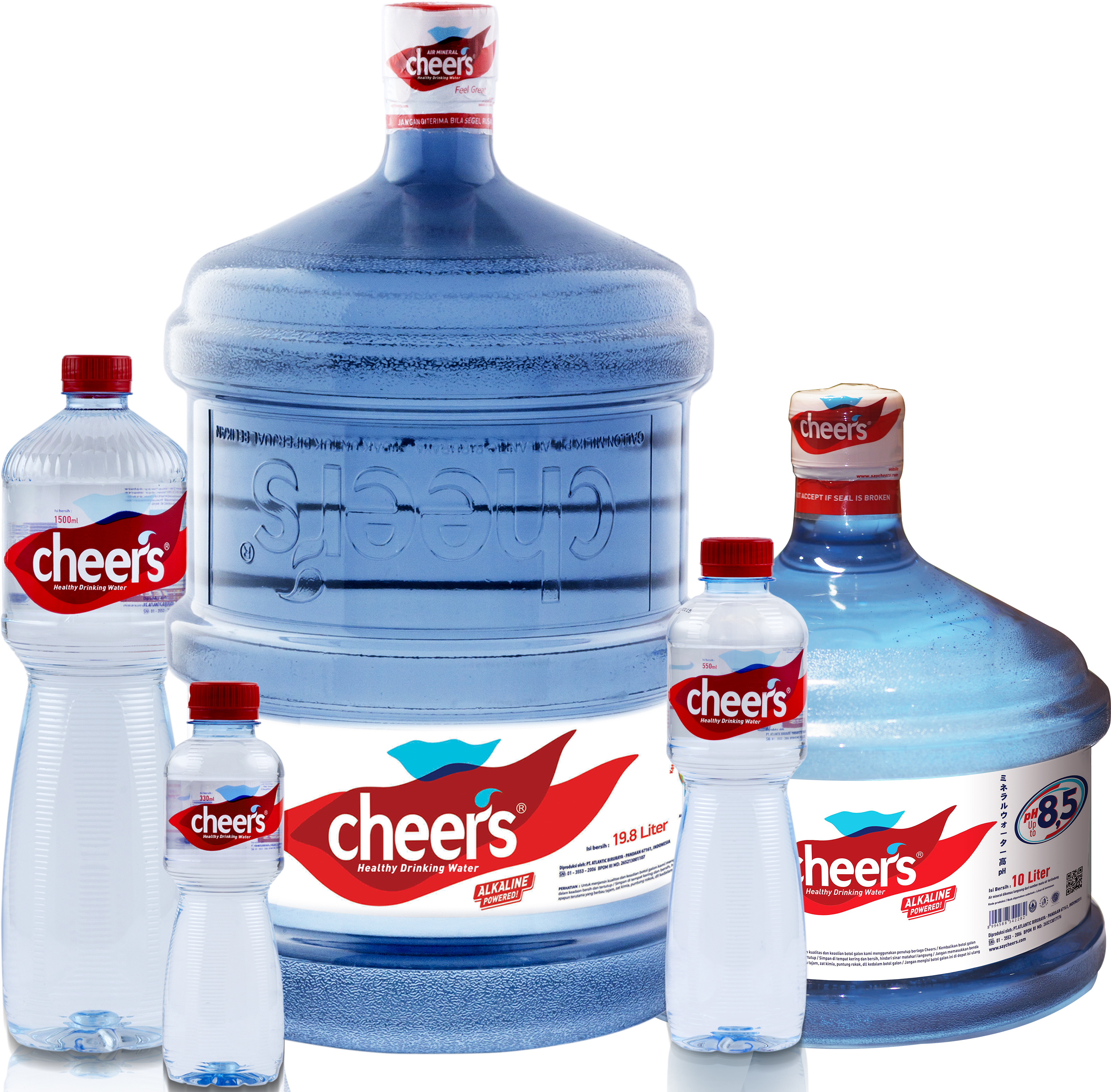 Produk Cheers Alkaline Powered